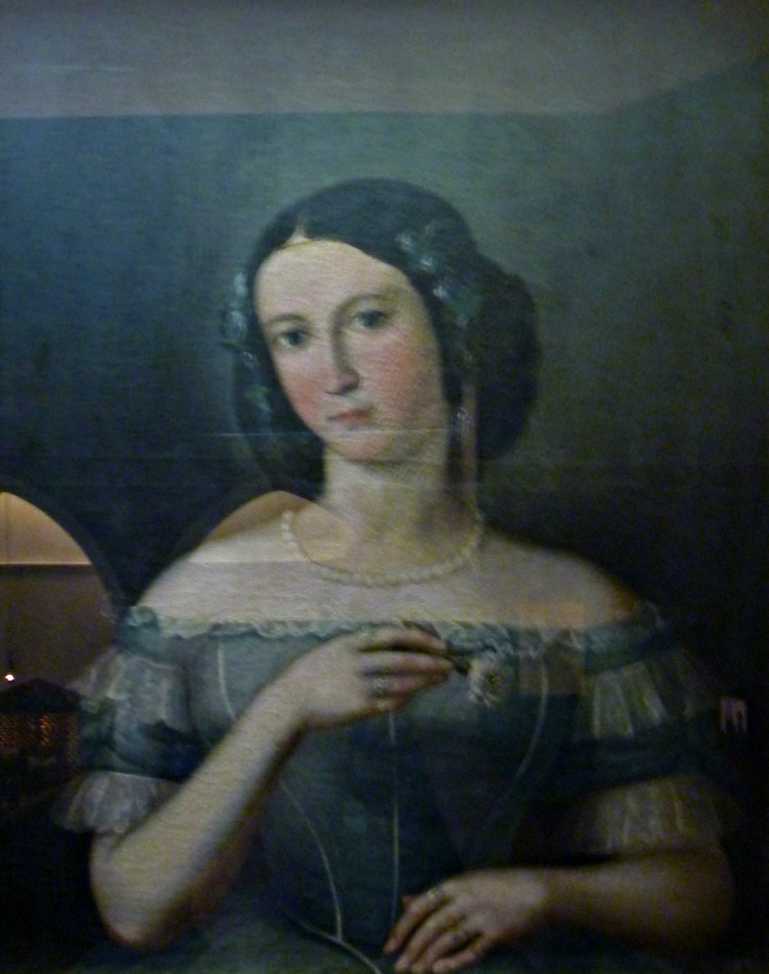 Óleo sobre lienzo. Exhibición del Museo de la Ciudad - Quito DM.